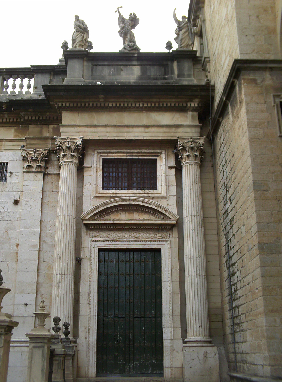 Catedral de Jaén. Puerta del Sagrario.